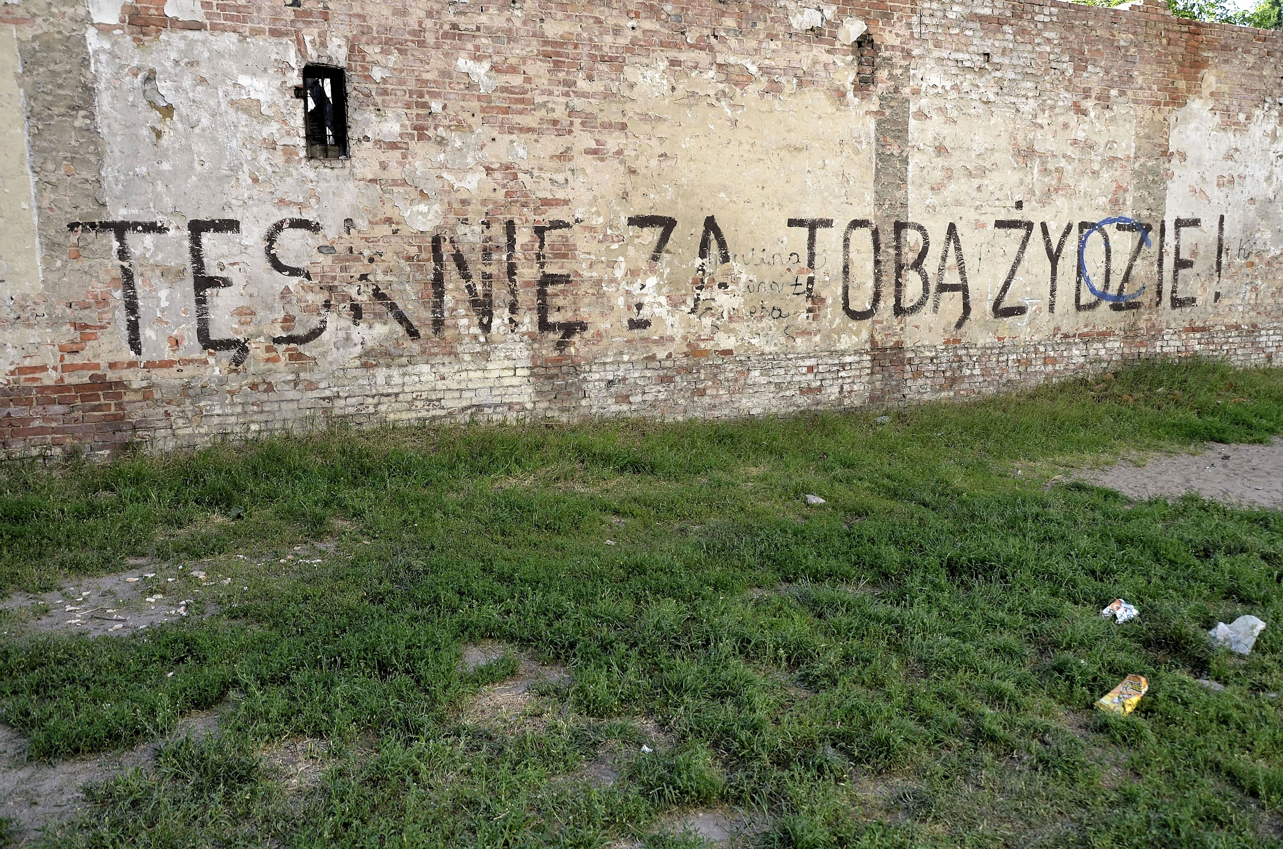 Zachowany napis akcji społecznej "Tęsknię za Tobą, Żydzie" Rafała Betlejewskiego na bocznej ścianie młyna Schutza i Parzyńskiego przu ul. Brzeskiej 8 w Warszawie